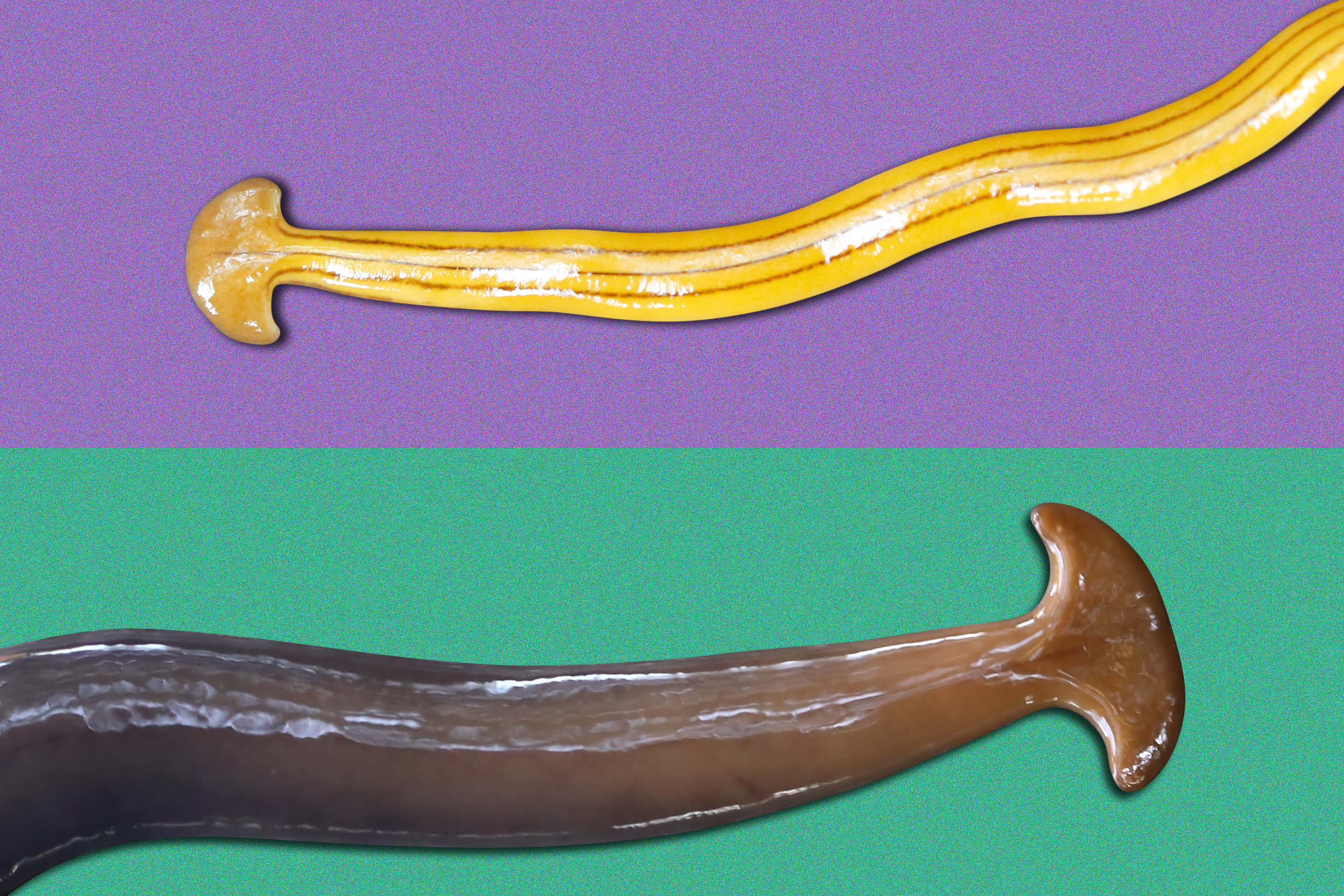 2種類のコウガイビル（上：オオミスジコウガイビル =Bipalium nobile、下：クロイロコウガイビル =Bipalium fuscatum） ※ キャプションレス仕様